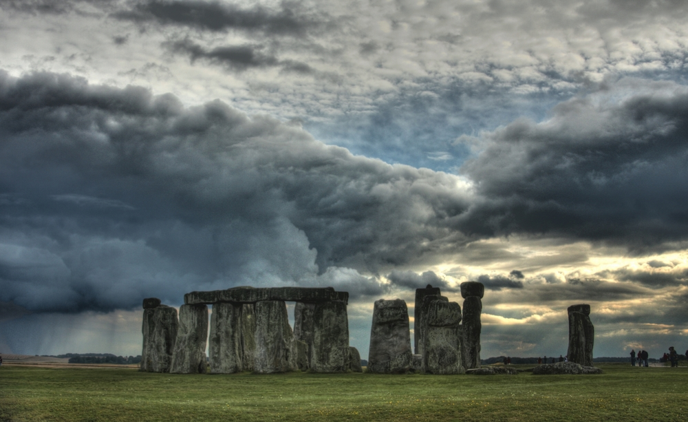 סטונהנג' 2010